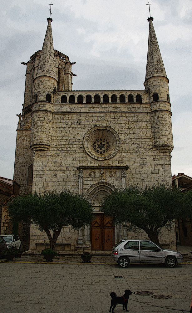 Església parroquial de Sant Esteve de Bordils (Gironès)